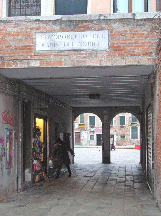 "Sotopòrtego" (sottoportico) a Venezia.